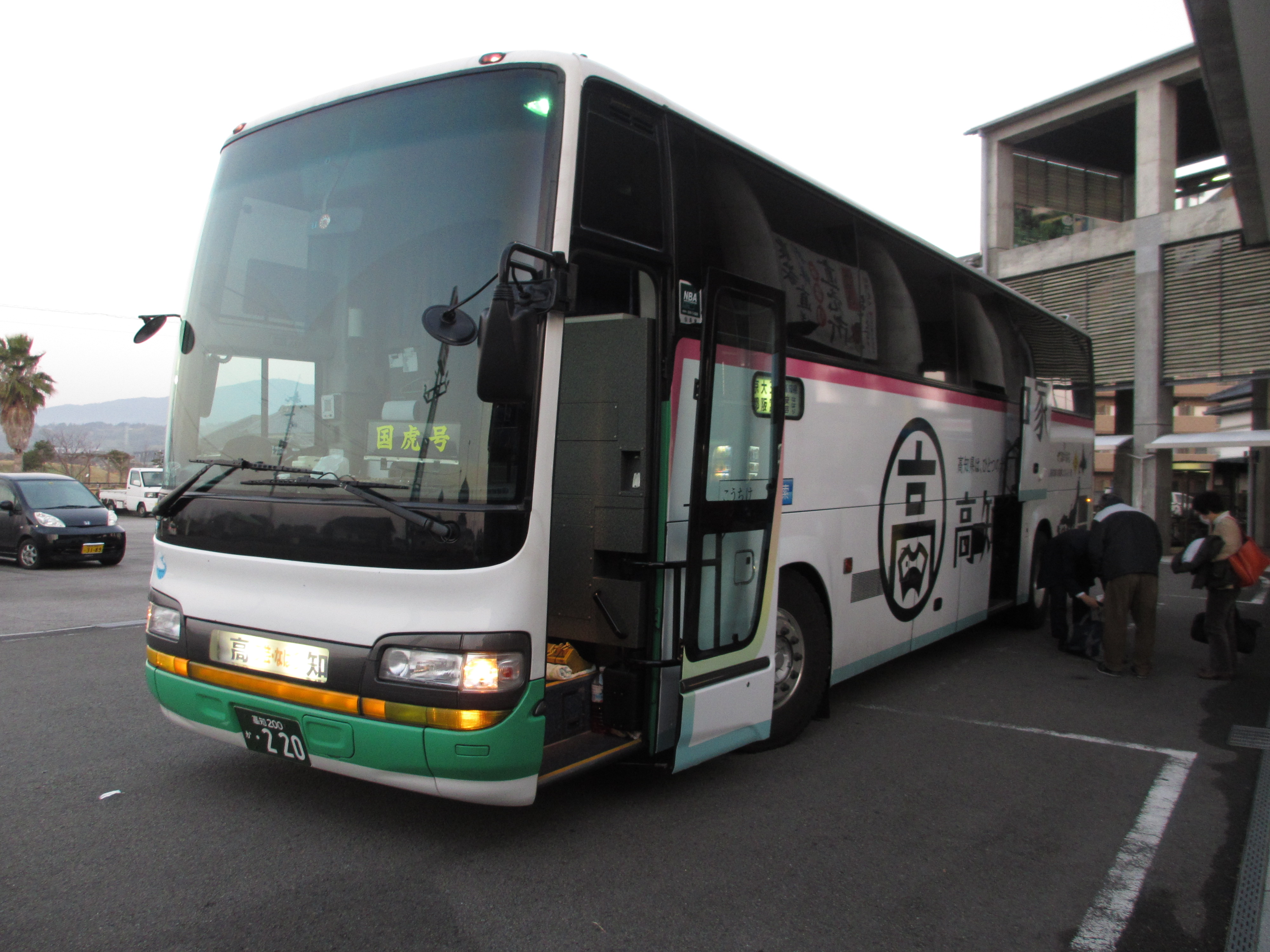 奈半利駅にて撮影。